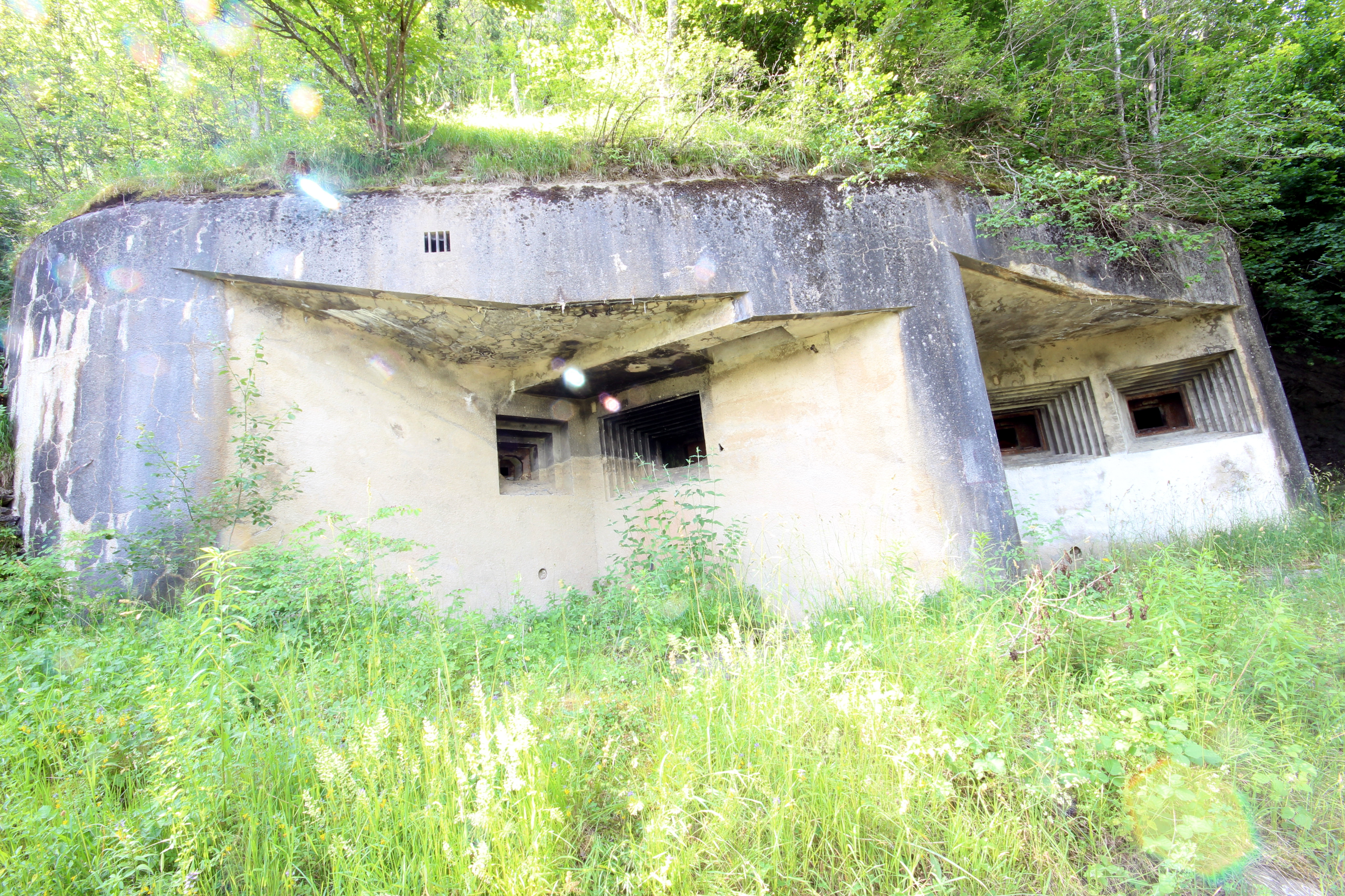 Vue d'ensemble du bloc entrée de l'ouvrage de la Cave-à-Canon